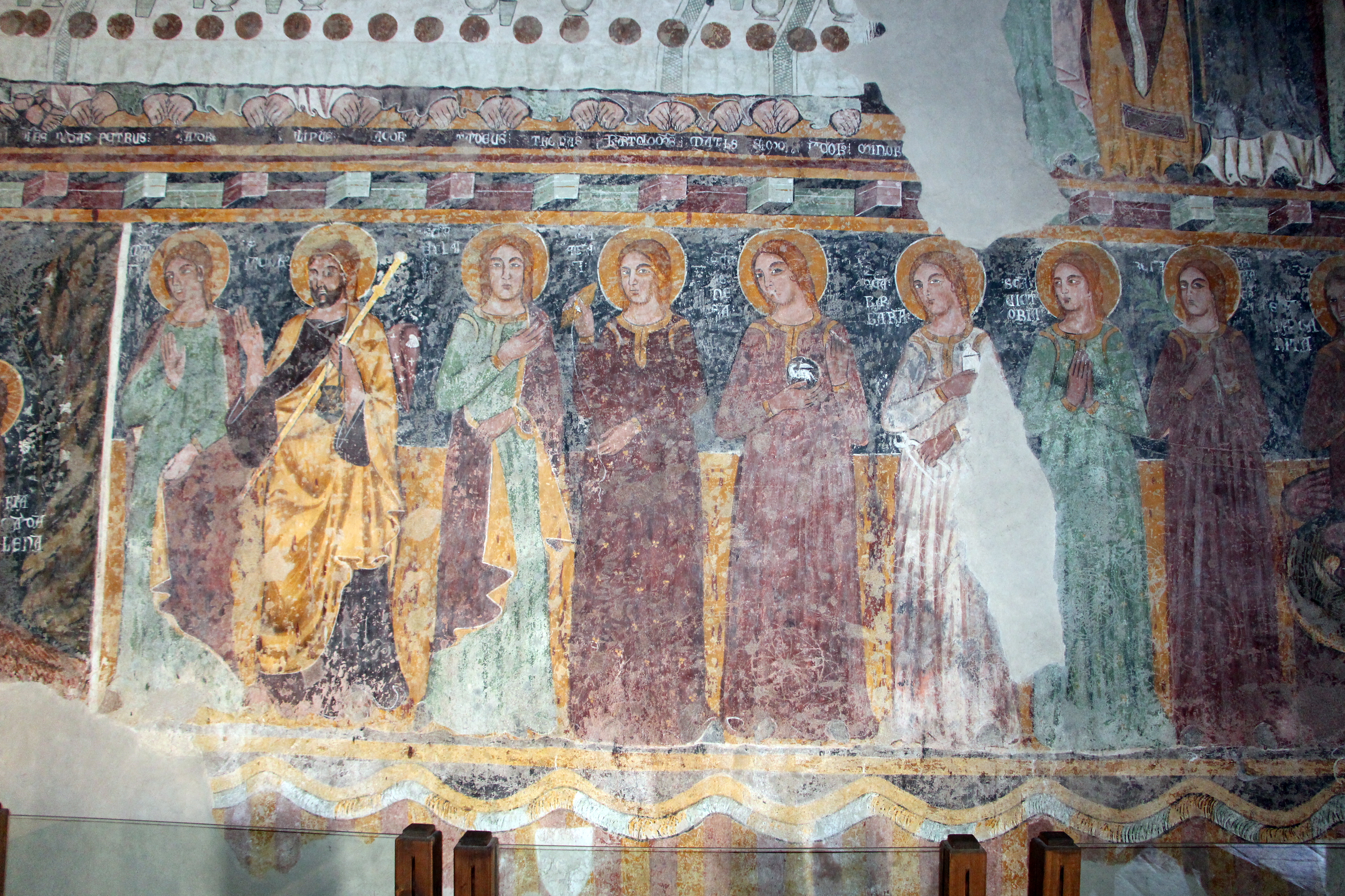 Castello Malaspina The making of this document was supported by Wikimedia CH. (Submit your project!) For all the files concerned, please see the category Supported by Wikimedia CH. This is a photo of a monument which is part of cultural heritage of Italy.